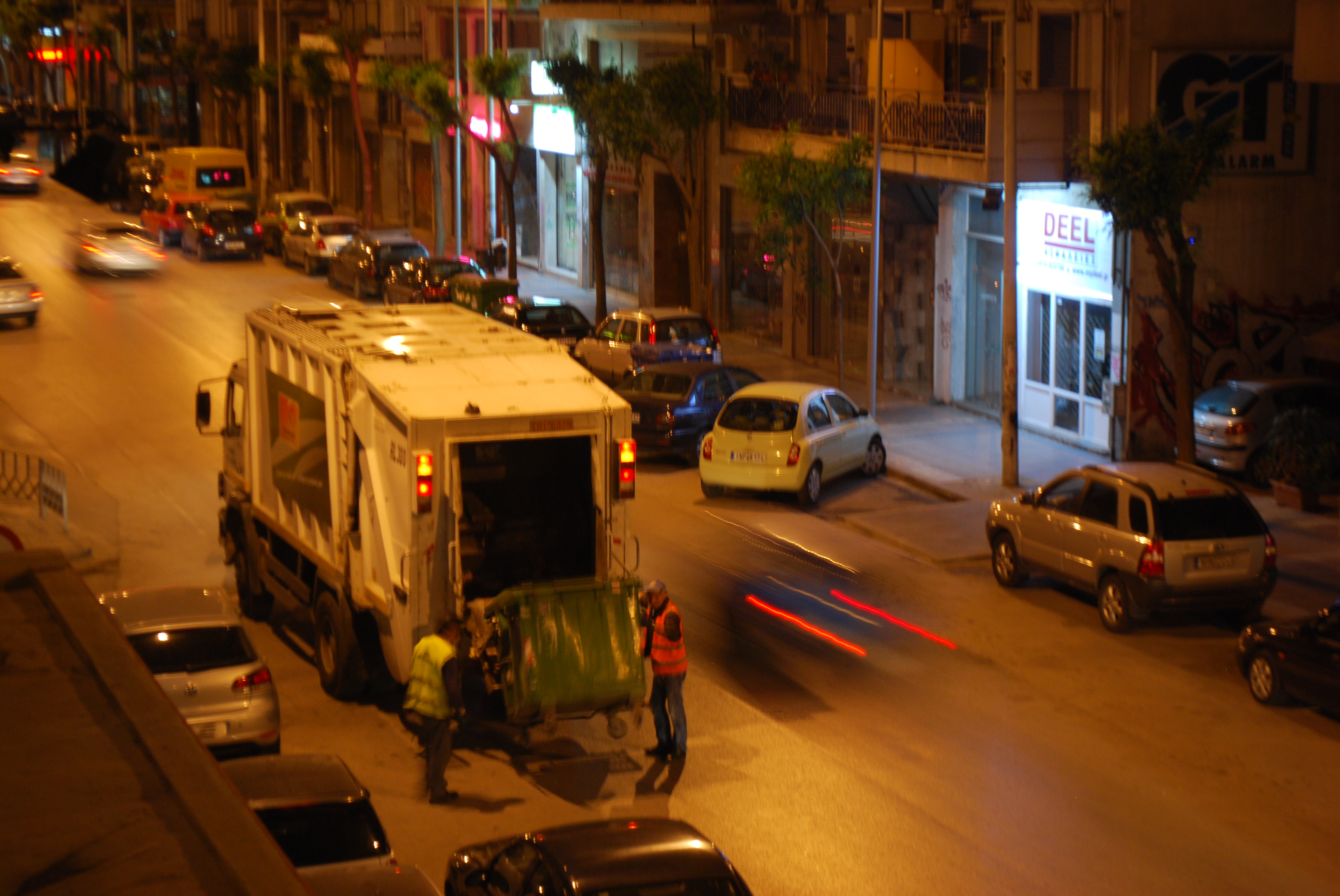 Vue de la collecte nocturne des immondices, dans la rue Saint-Demetreios (Odos Agiou Dimitriou) à Thessalonique en Grèce (19 mai 2016).